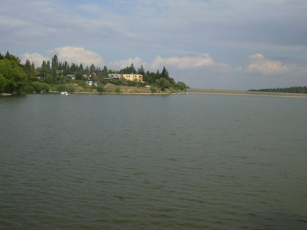 Plumlovská přehrada